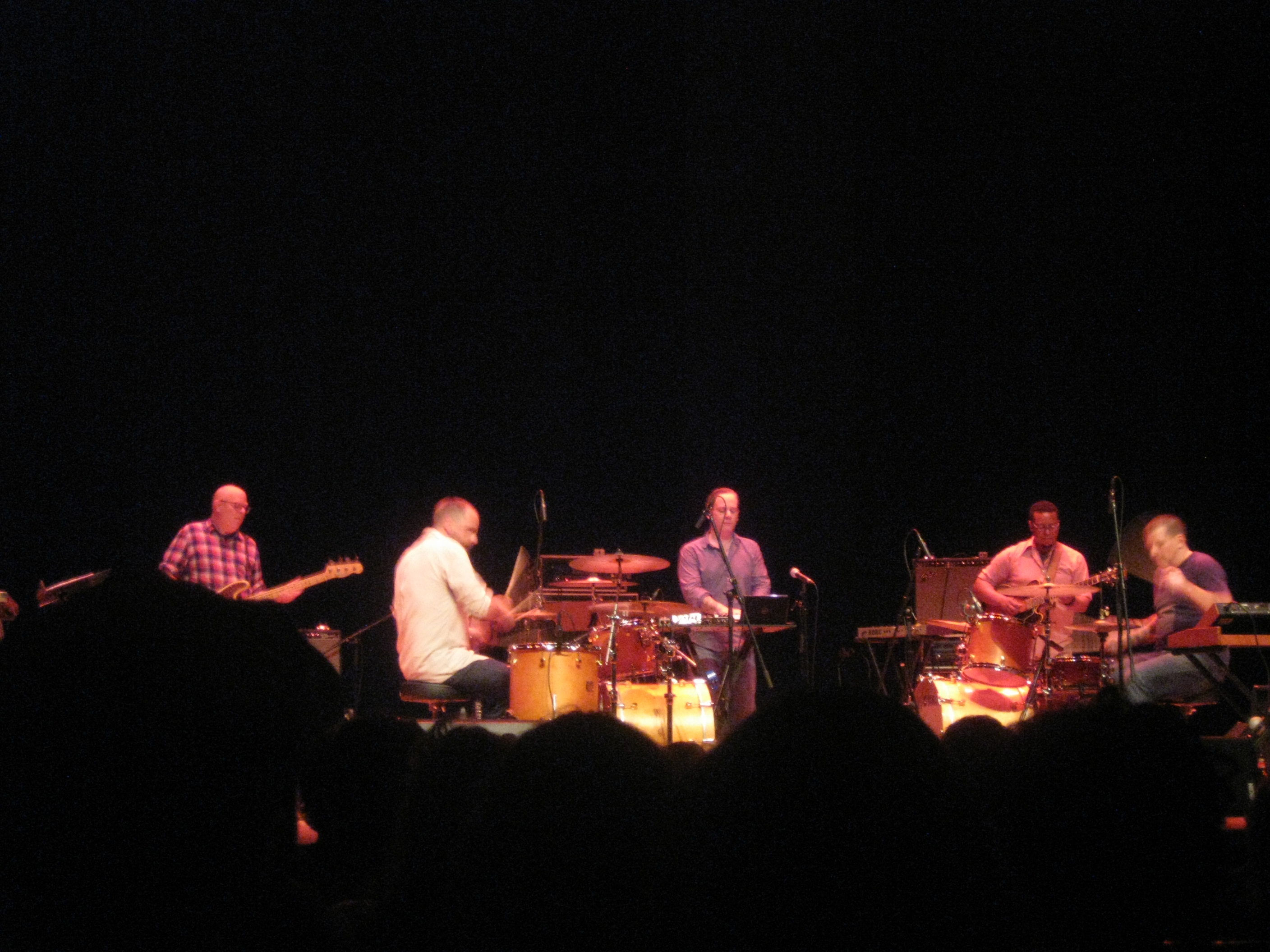 A banda Tortoise no Auditorio de galicia de Santiago de Compostela.